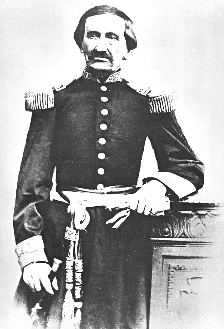 Antonio Gutiérrez de la Fuente (1796 - 1878) militar y político peruano. Jefe Supremo del Perú en 1829. Gran Mariscal del Perú.